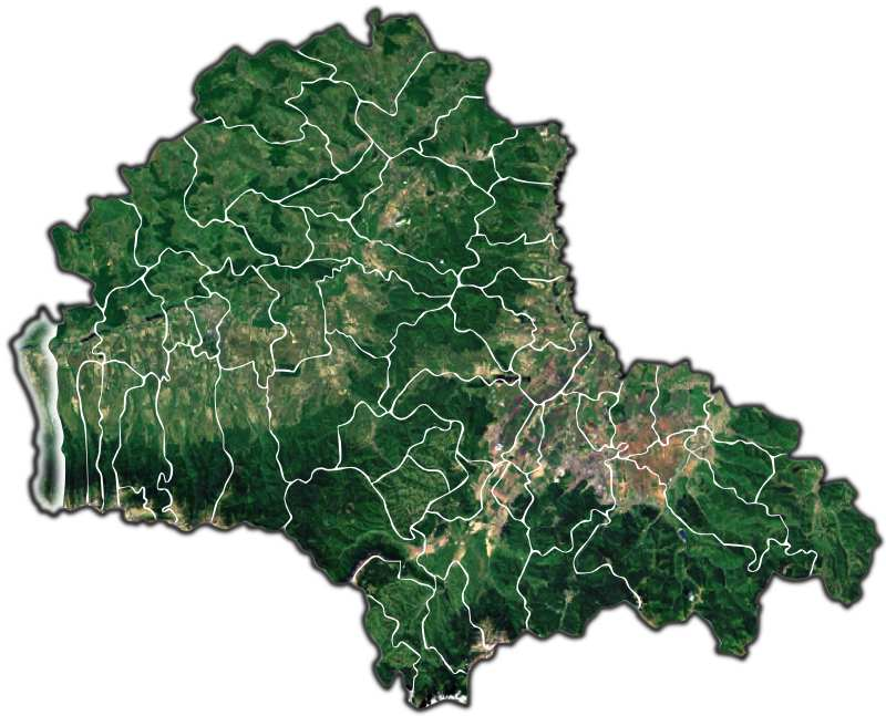 Victoria jud Brasov.